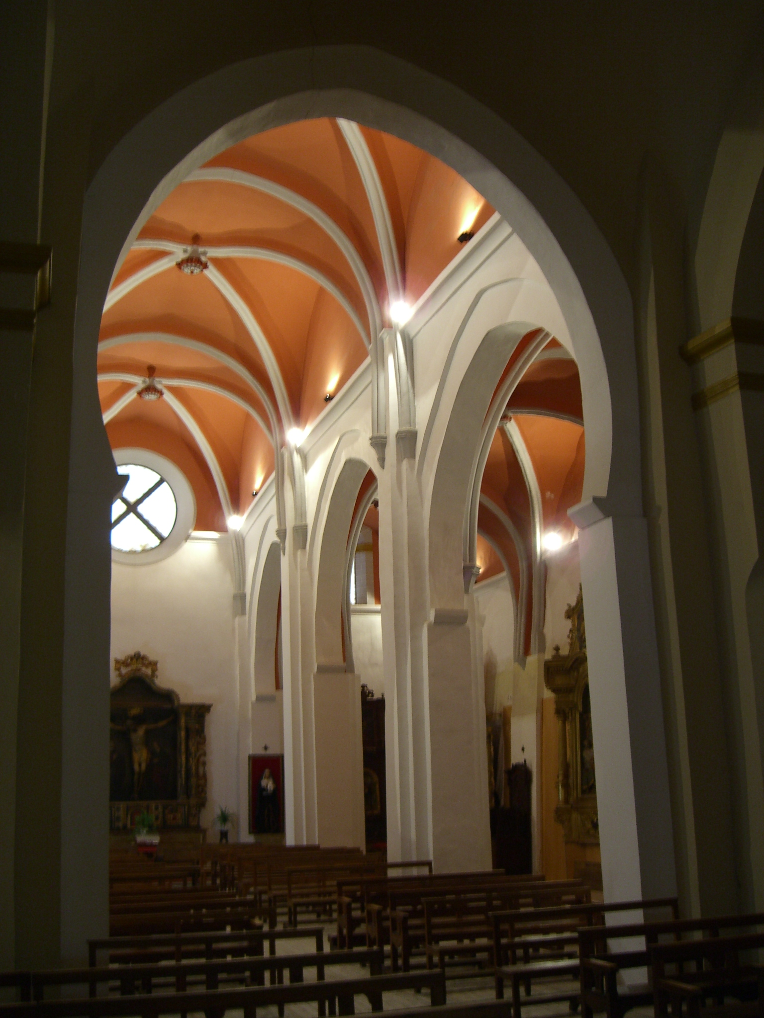 S. Andres. Calatayud. En blanco, mezquita s.XI.